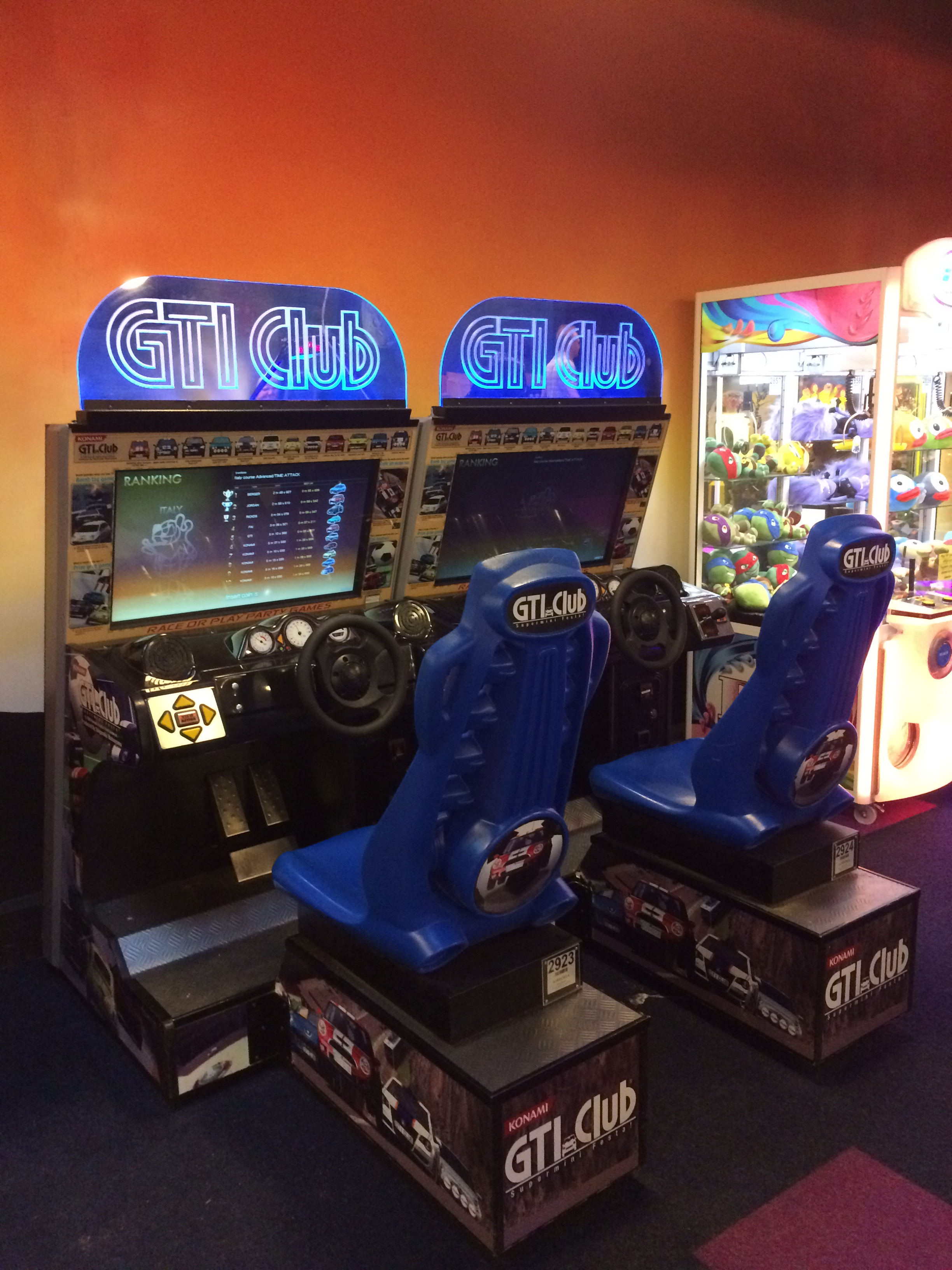 Arcade Konami GTI Club